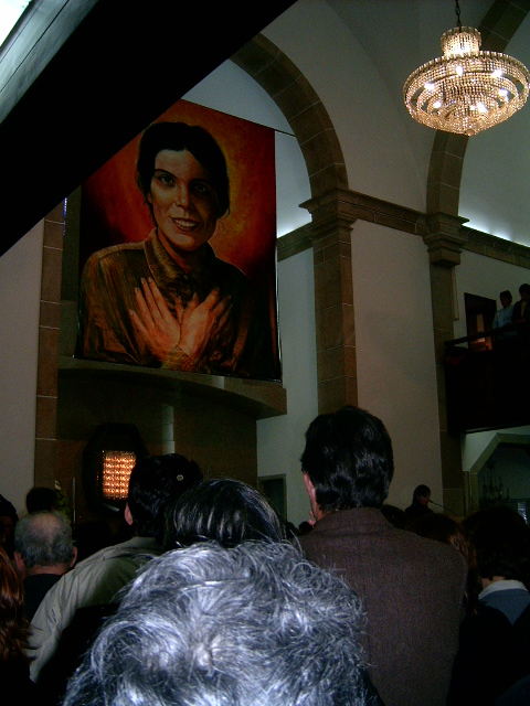 Retrato de Alexandrina Maria da Costa en la iglesia de Balasar Church in Balazar, Where Alexandrina Maria da Costa lived (with her picture) Foto of Manuel Anastácio